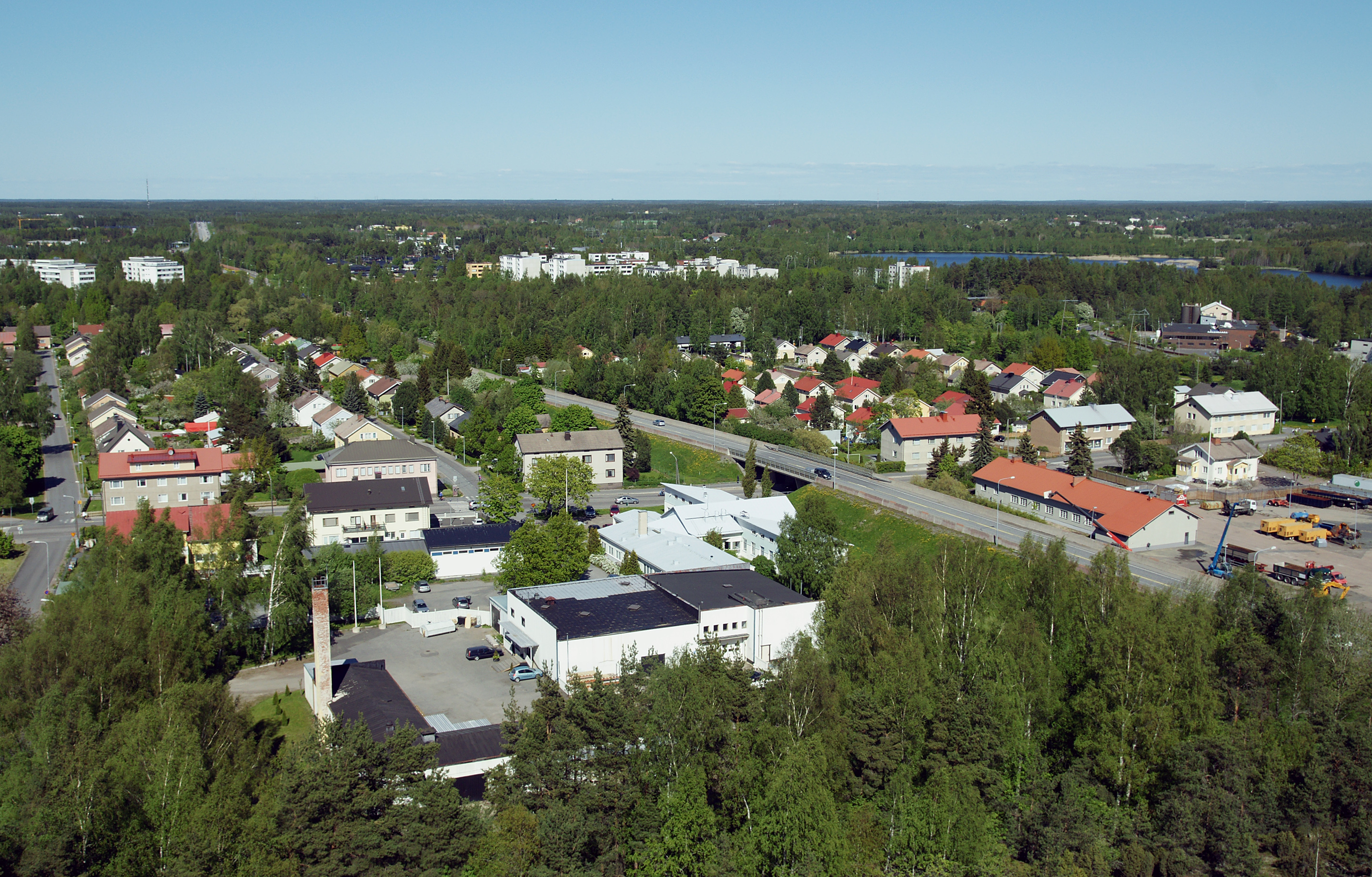 Valtatie 8 Rauman kohdalla. Kuva otettu Rauman vesitornista.